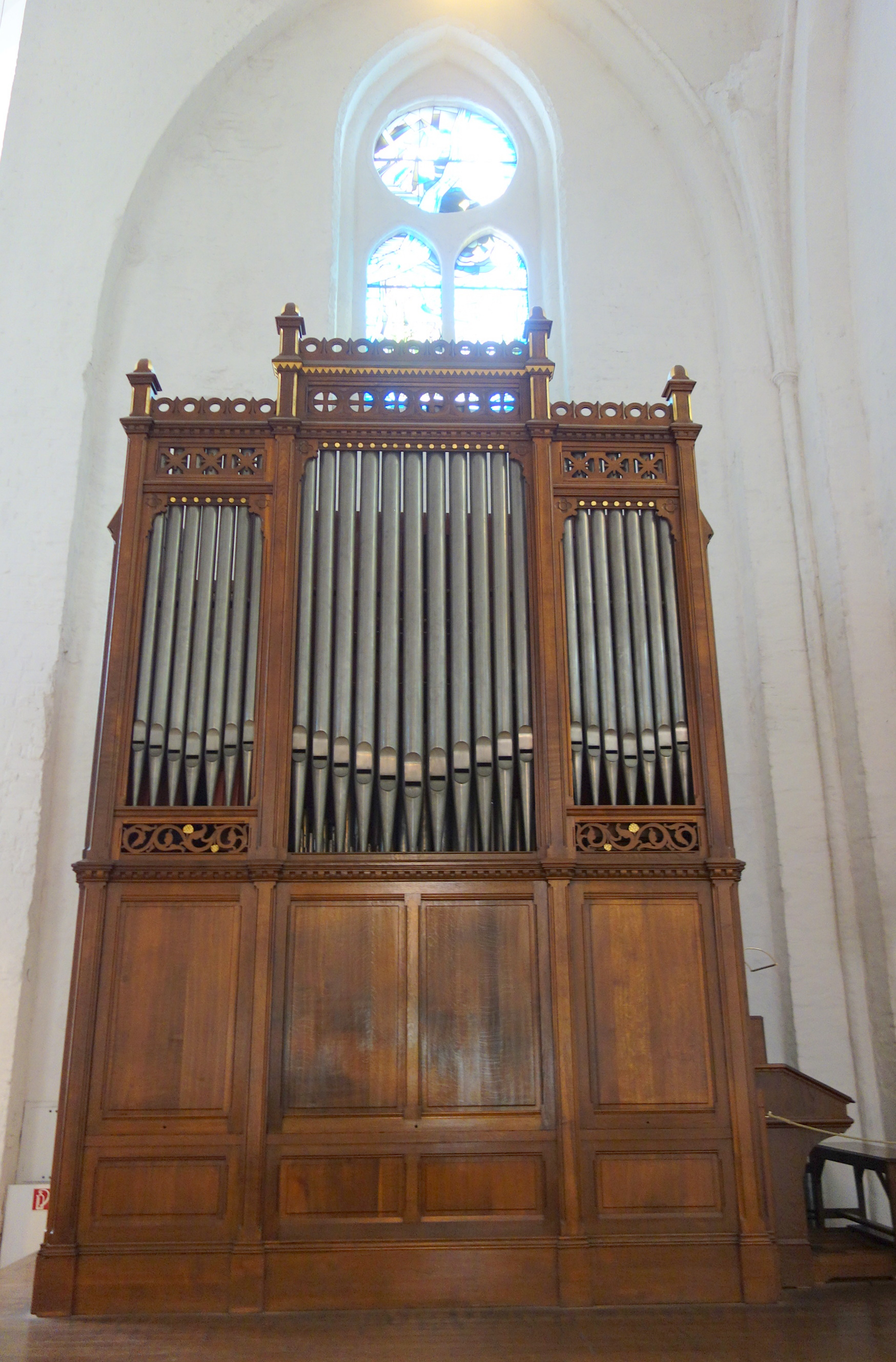 Orgel der Nikolai-Kirche, Kiel, Schleswig-Holstein, Deutschland